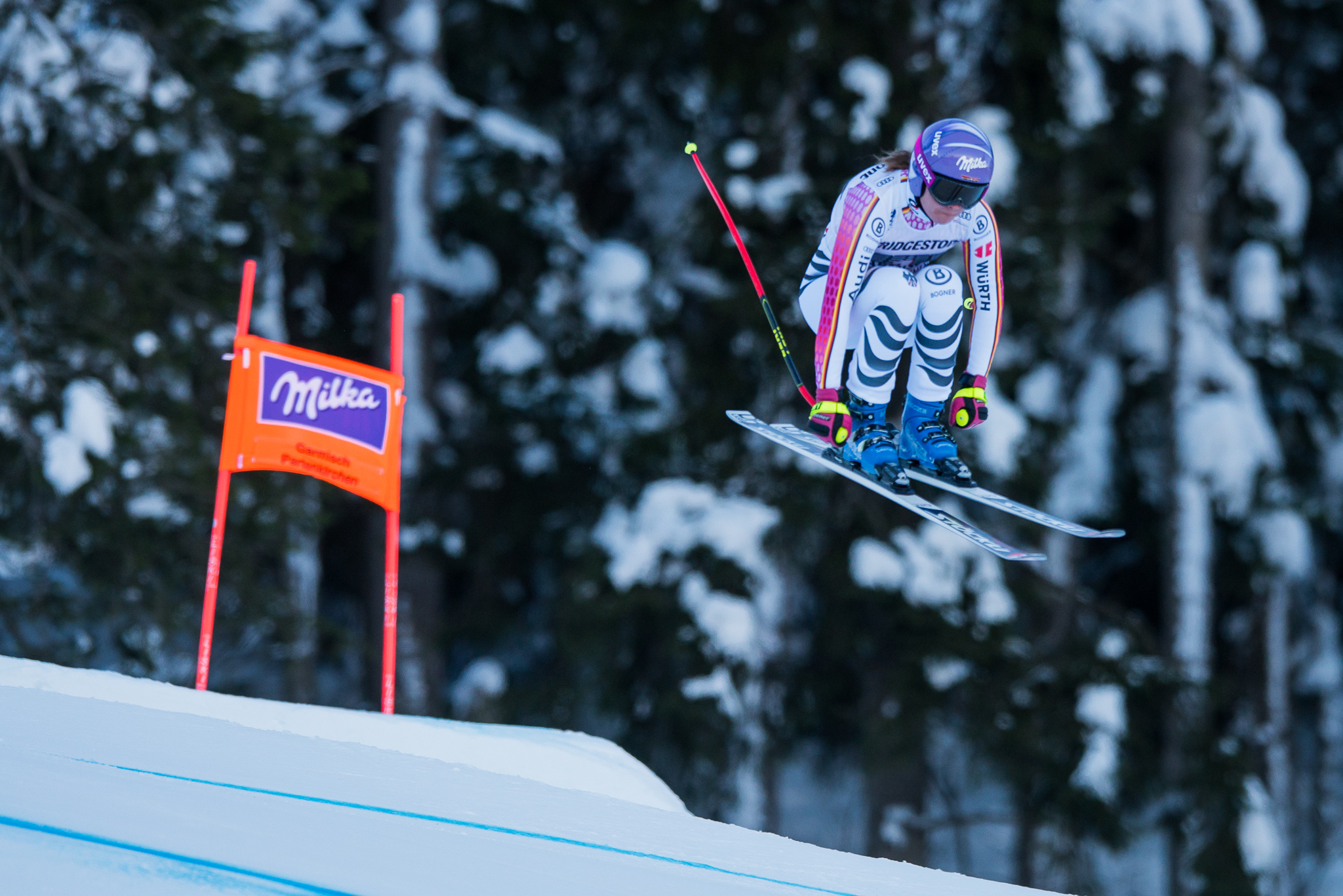 64. Kandahar Rennen,Audi FIS Ski Weltcup Garmisch-Partenkirchen,Damen Abfahrt,Kandahar,Ladies Downhill,Viktoria Rebensburg